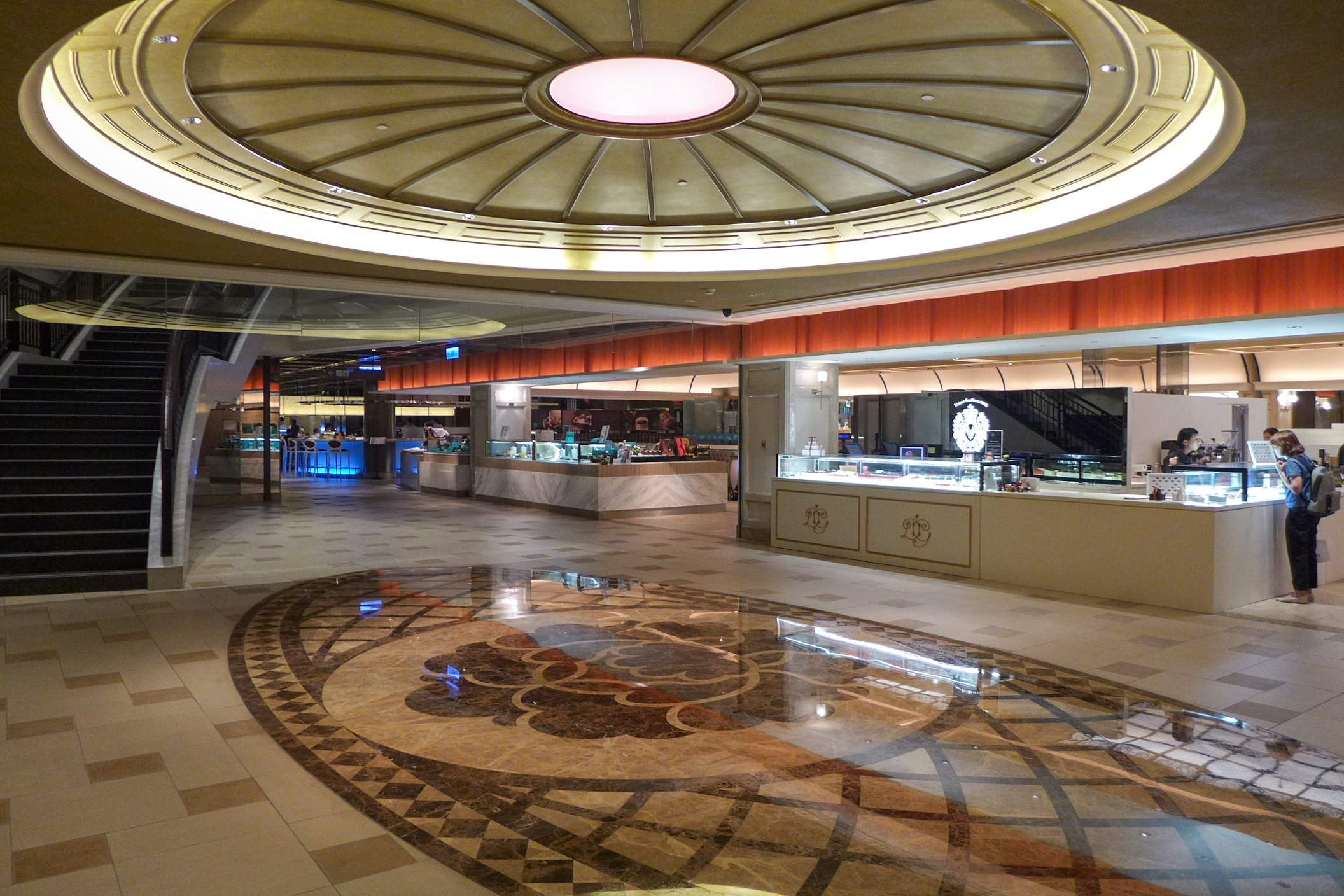 Bellavita